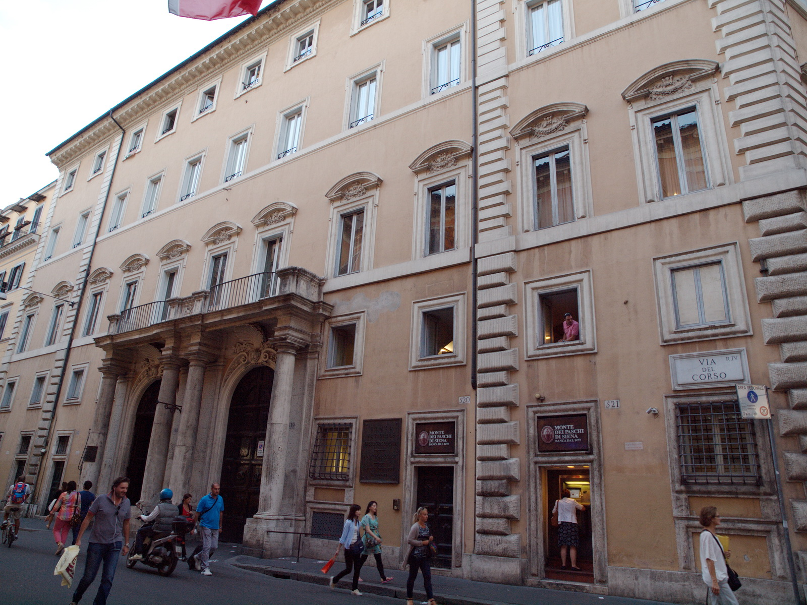 orologio a sei ore